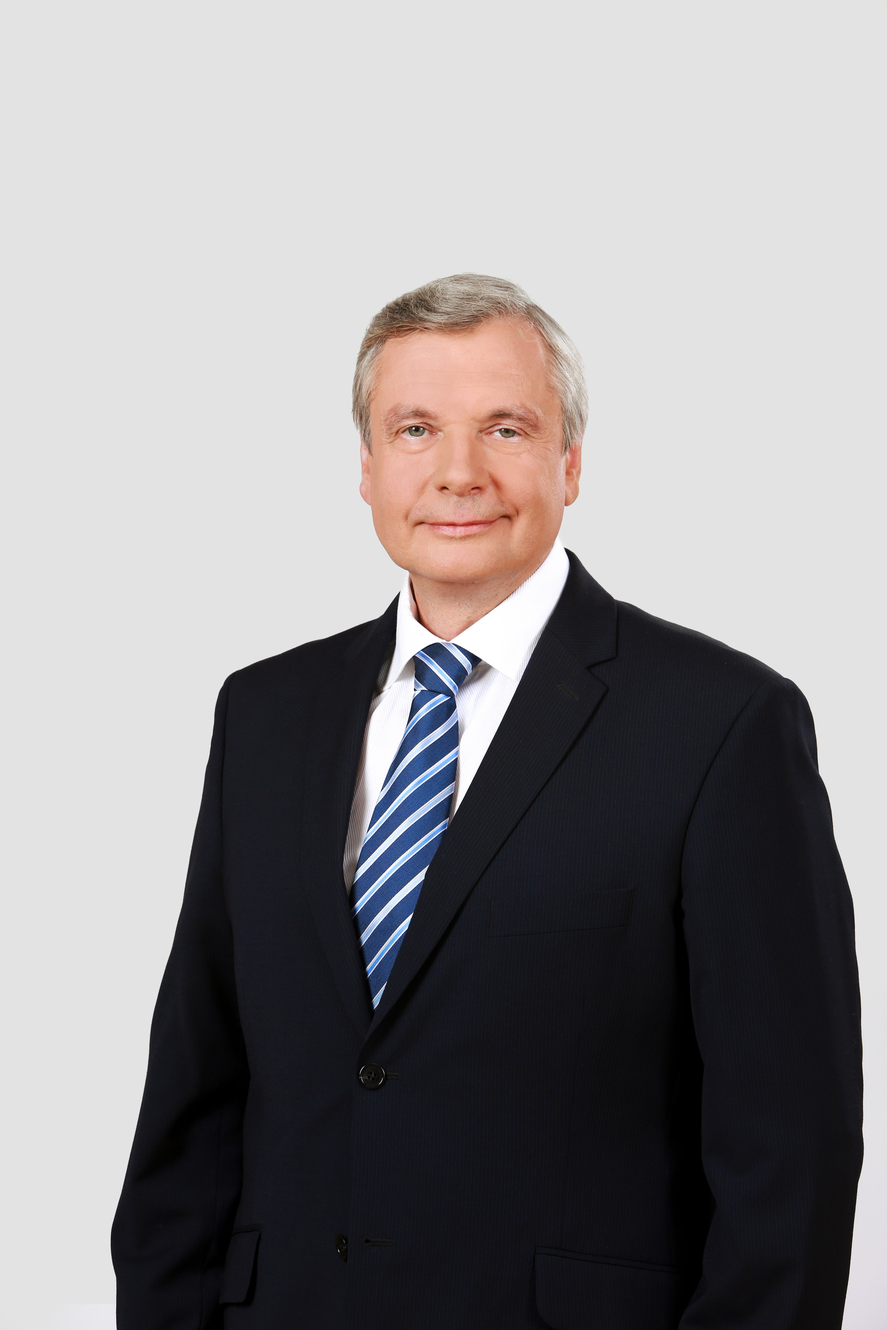 2014.gada 9.decembris. 12.Saeimas deputāts Kārlis Šadurskis. Foto: Partijas Vienotība publicitātes foto